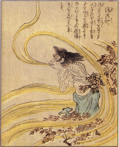 Kaze-no-kami (風の神, Fūjin) from the Ehon Hyaku monogatari (絵本百物語)